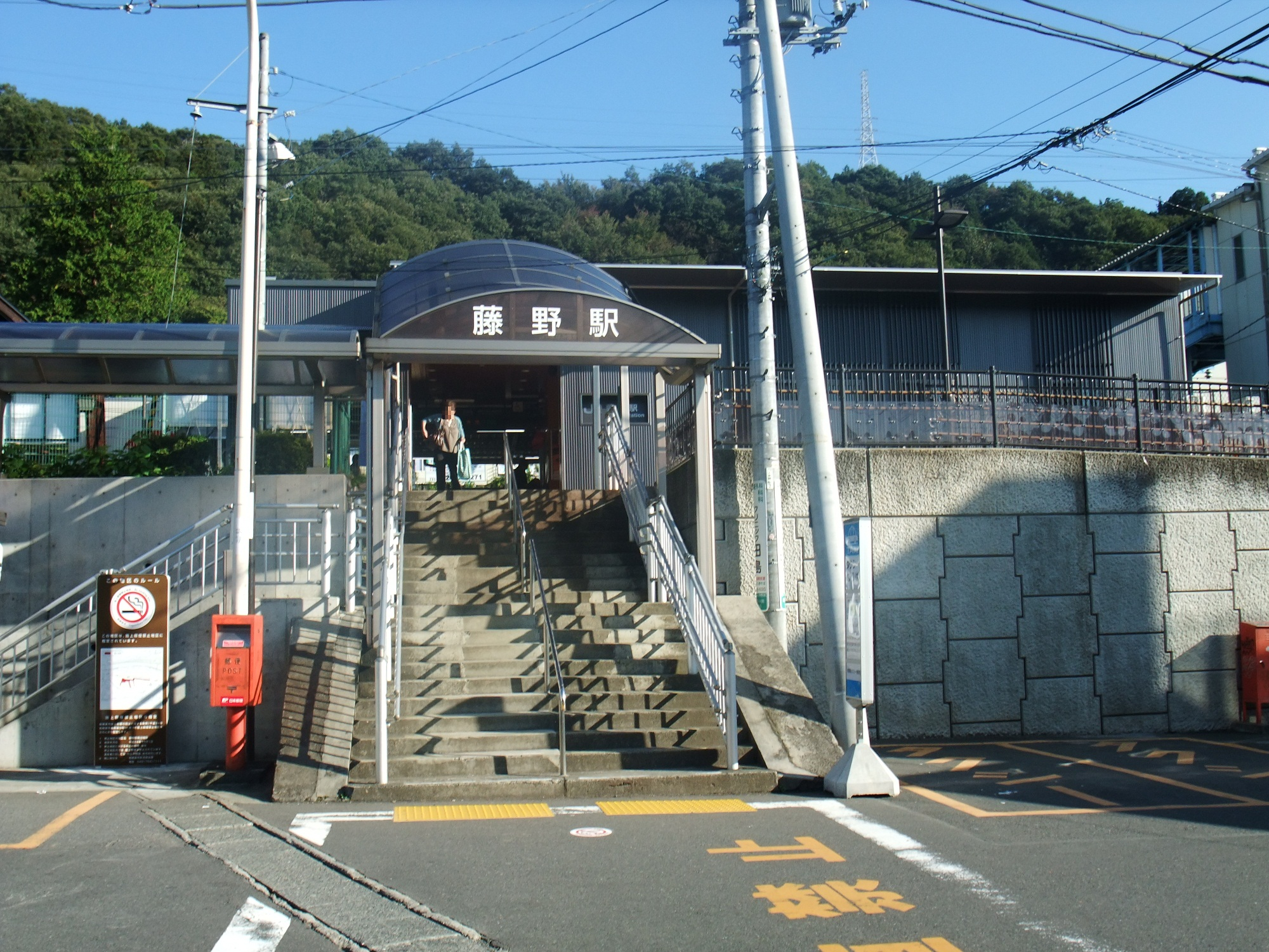 JR東日本中央本線藤野駅